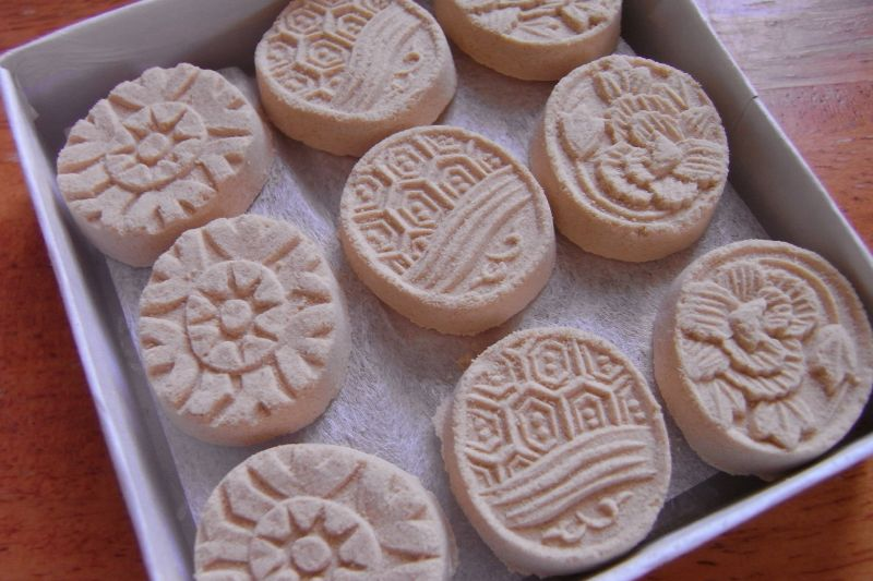 いただきもの。口に入れると、さーっととけちゃう。